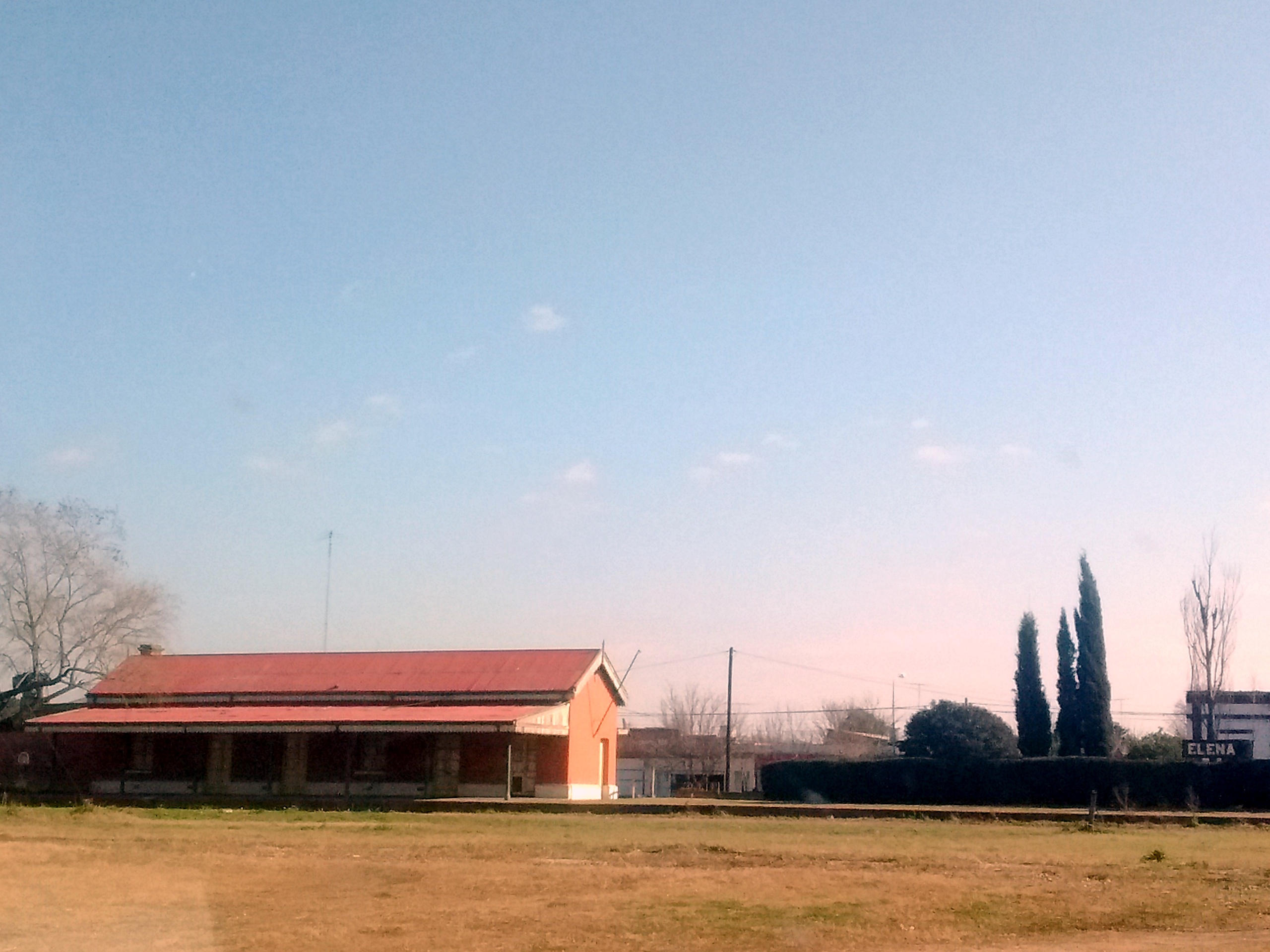 Estación de trenes con su anden y cartel nomclador